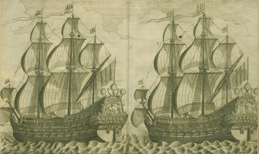 Das Bild zeigt die Konvoischiffe Leopoldus Primus und die Wapen von Hamburg